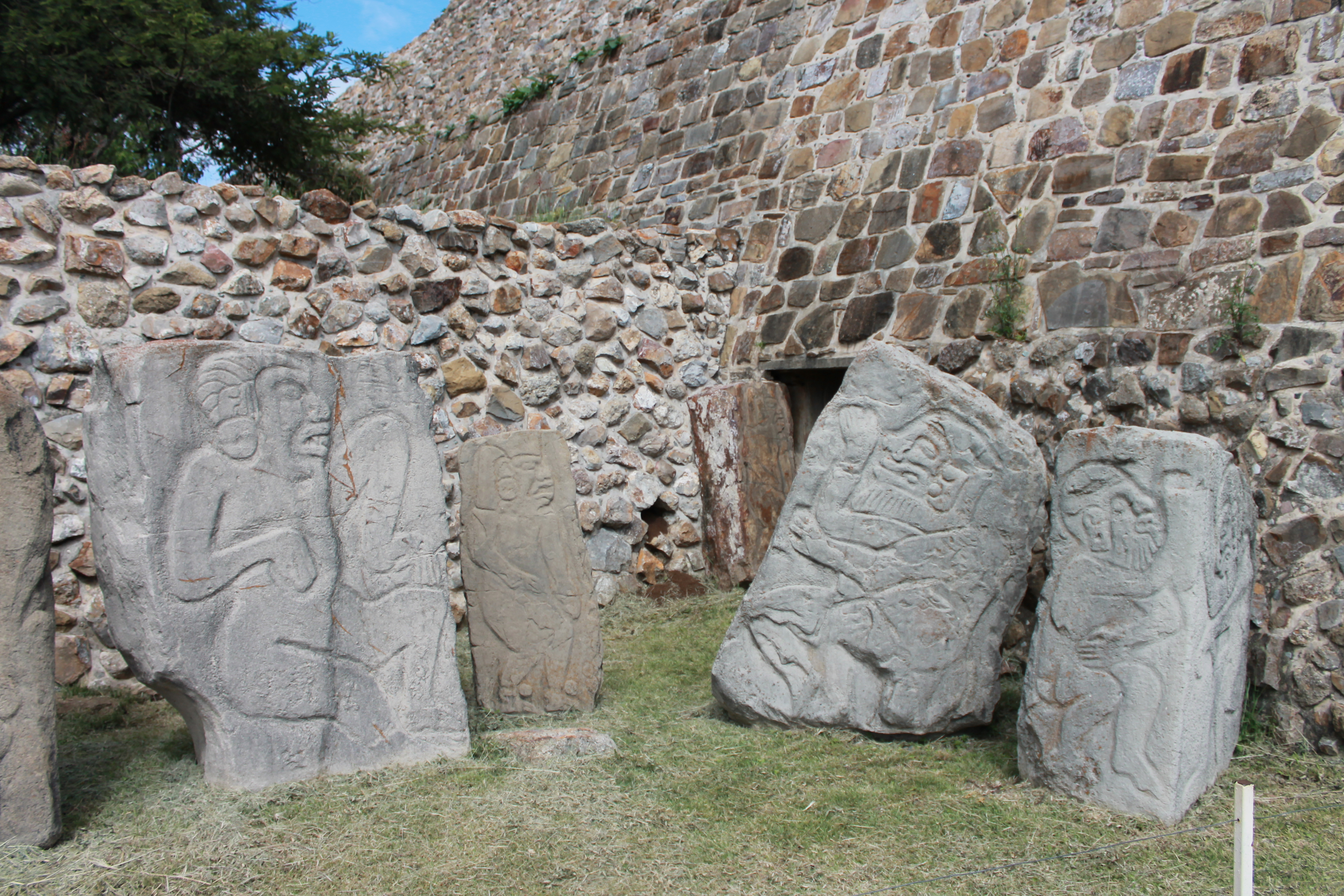 En la imagen se aprecian 4 piedras, en cada una de las piedras se encuentra grabada una figura humana en una posición dinámica. En algunas piedras se pueden divisar símbolos y fechas que narran acontecimientos históricos.